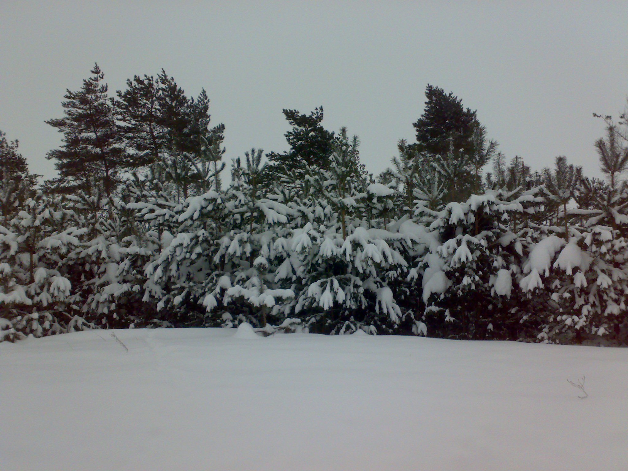 Живописные места возле хутора